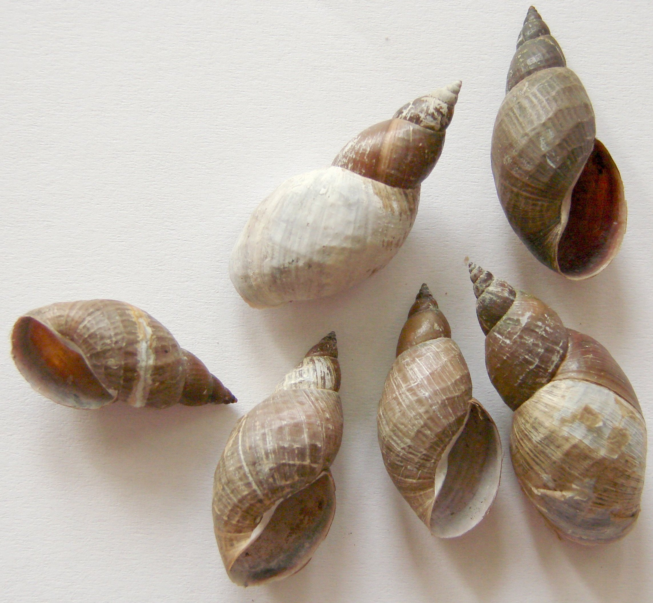 Lymnaea corvus (Galba palustris v. corvus)